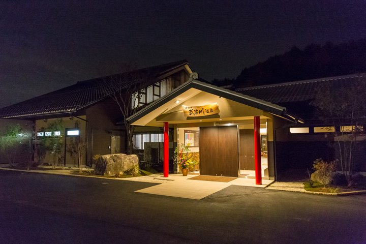 武芸川温泉外観